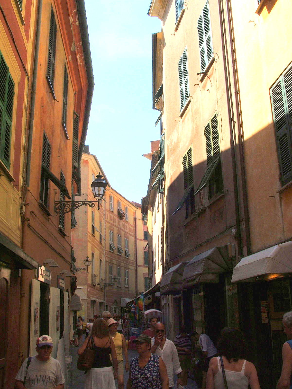 Immagine da Sestri Levante